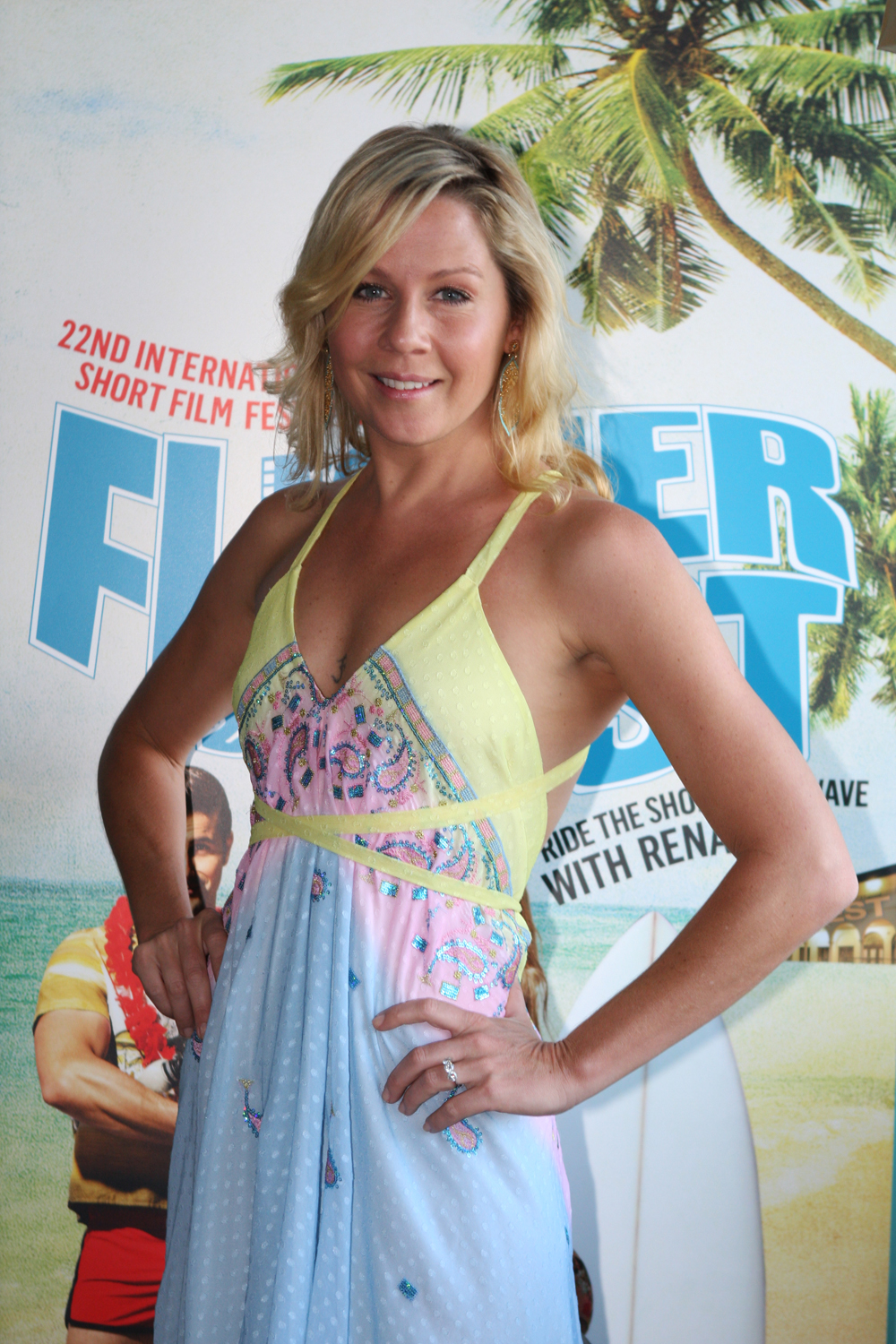 Gigi Edgley